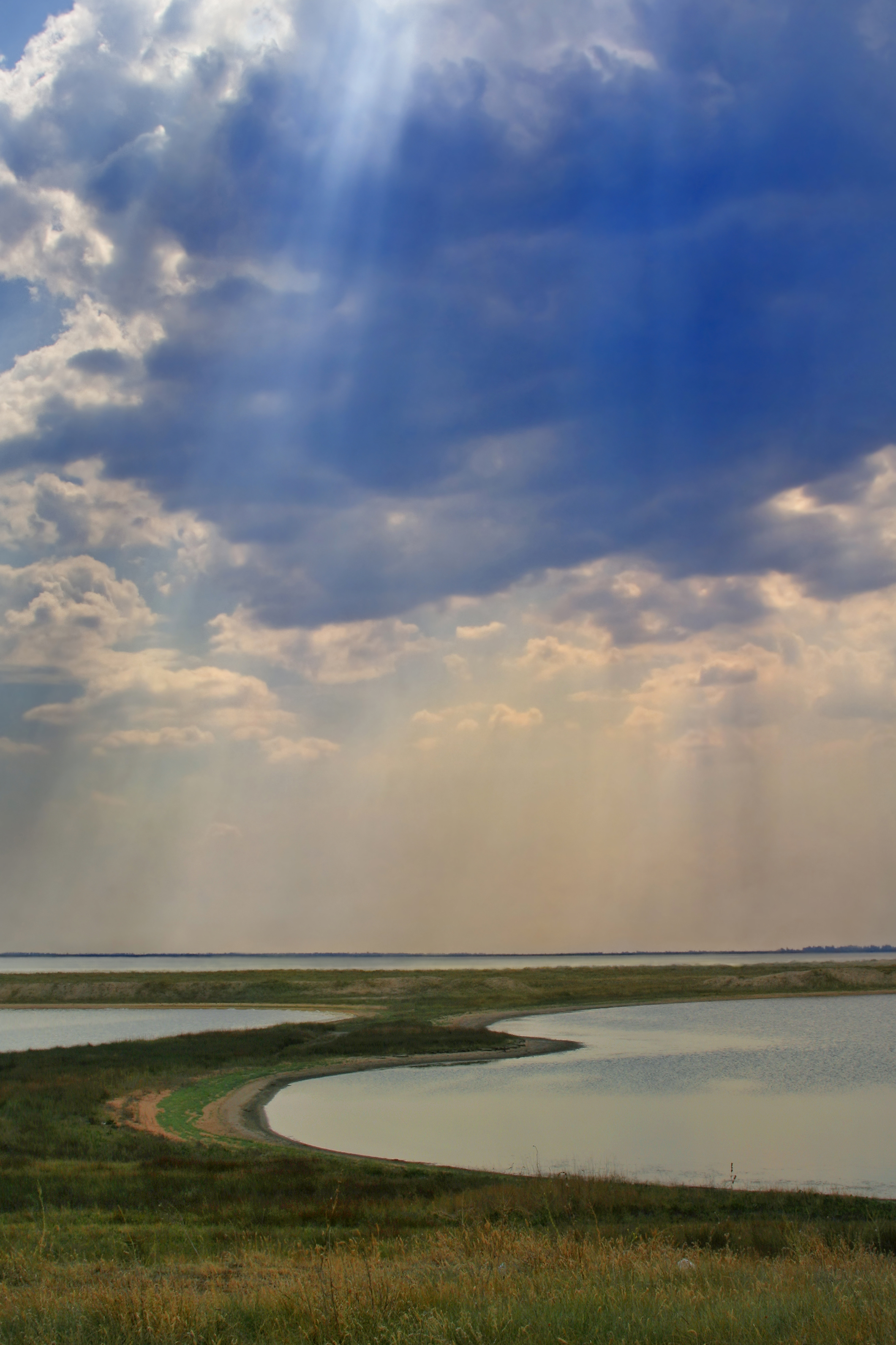 Valgusest võlutud